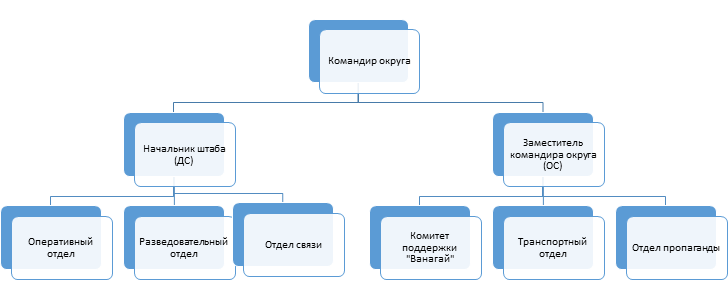 структура